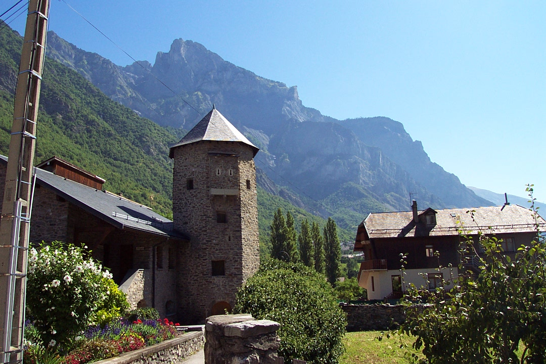 La tour de Saint-Julien-Mont-Denis, en Savoie